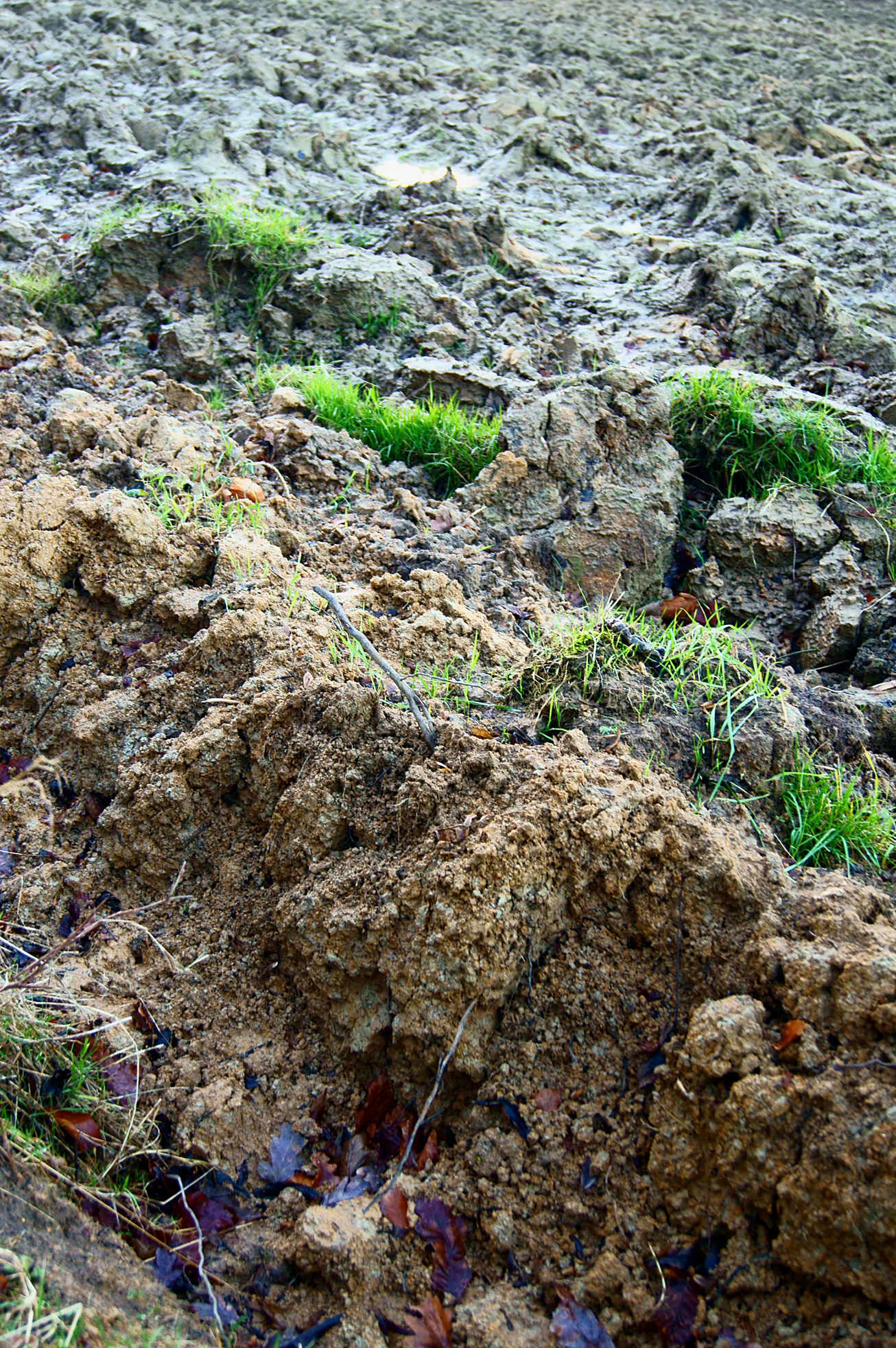 Übergang von Rendzina-Braunerde zu Gley-/Pseudogley-Boden auf einem Acker zwischen dem Bach Rottbecke im Norden und der Wallburg Oldenborg im Süden bei Laer im Münsterland.